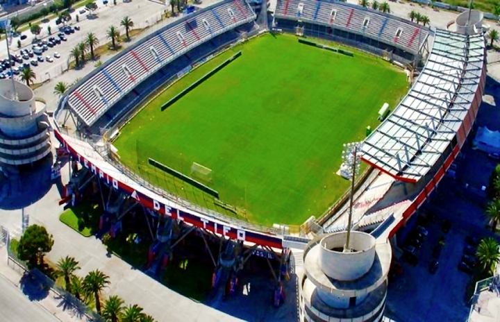 Stadio Riviera delle Palme prima della della copertura integrale.